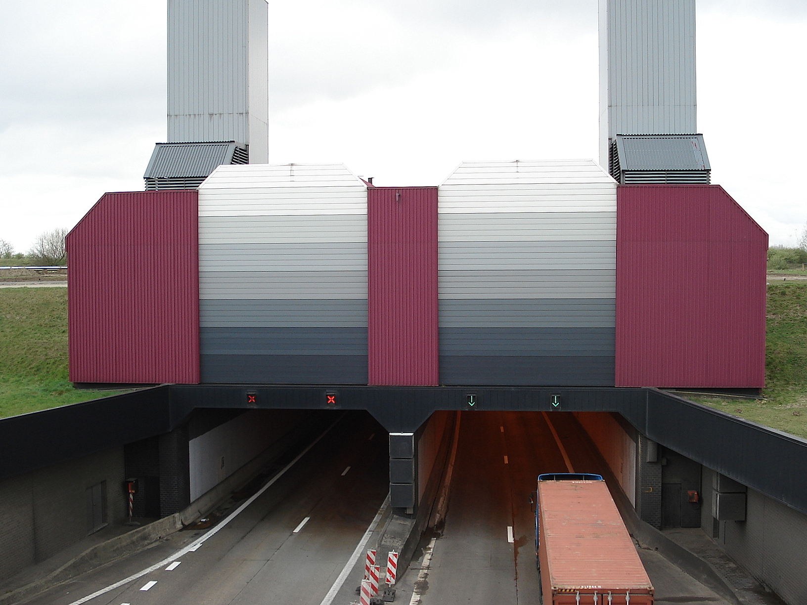 Ingang Liefkenshoektunnel op rechteroever, nabij plaatsje Lillo-Fort (stad Antwerpen, België).